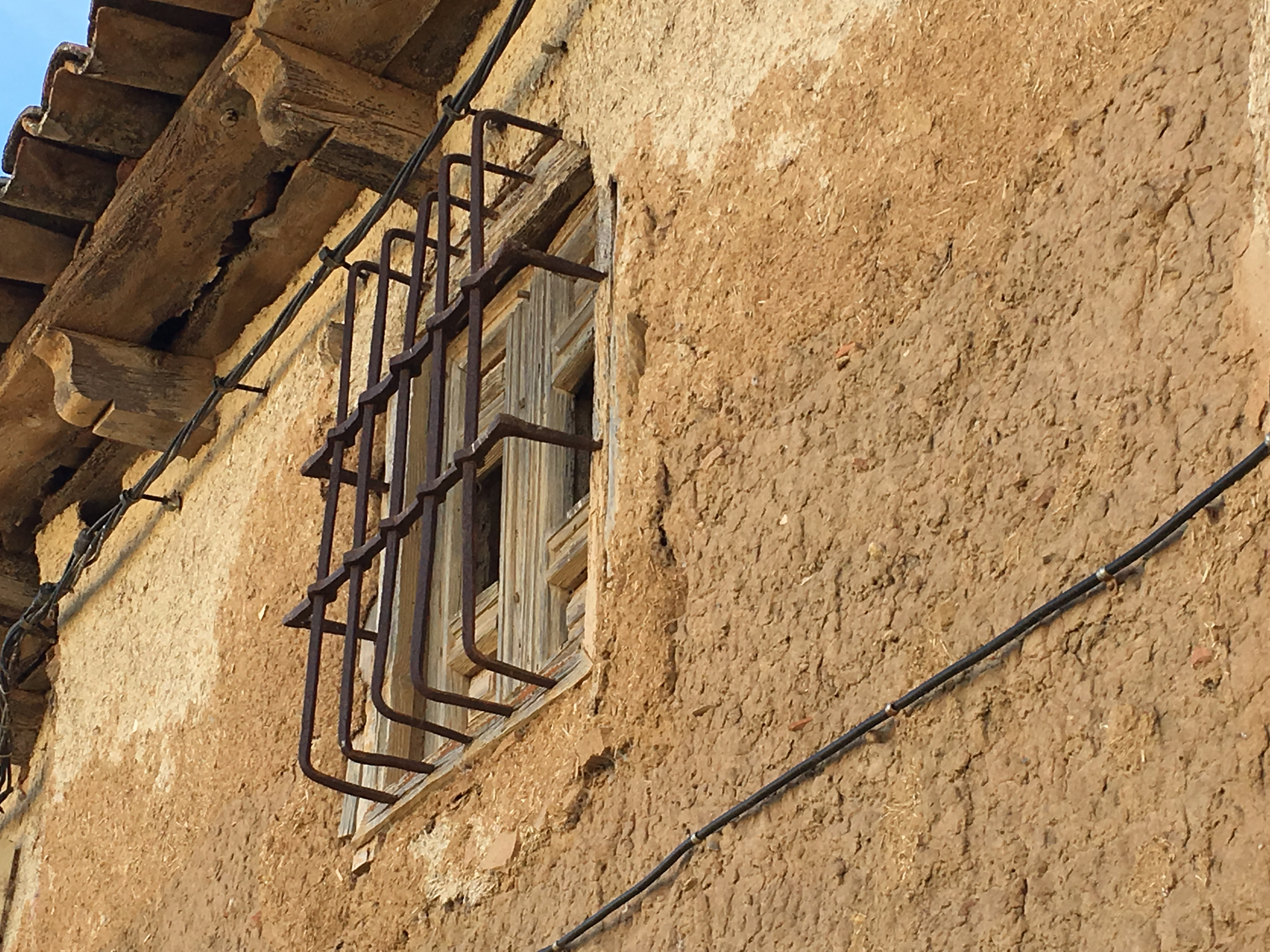 Villaesper Milenario